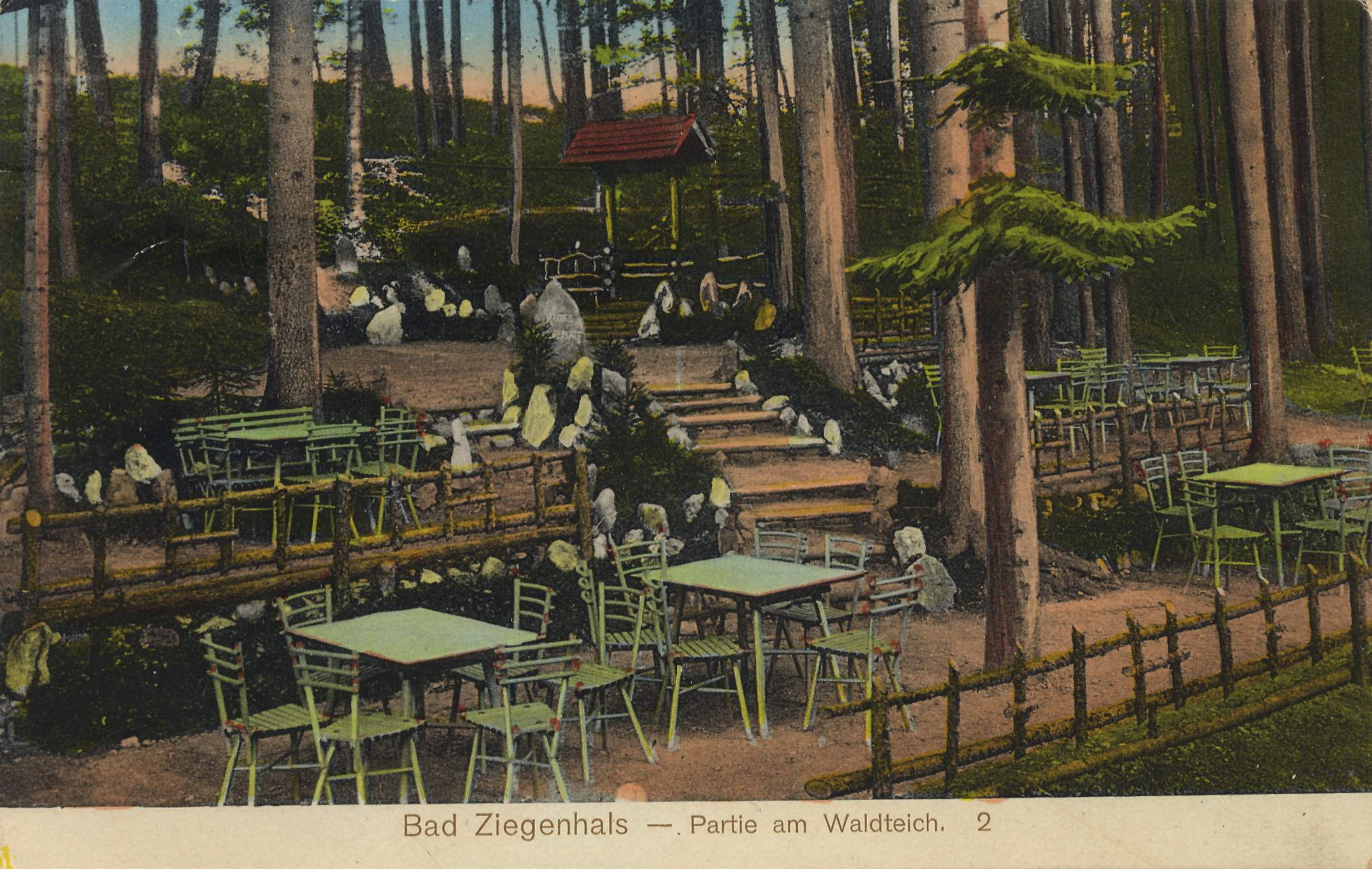 Waldteich